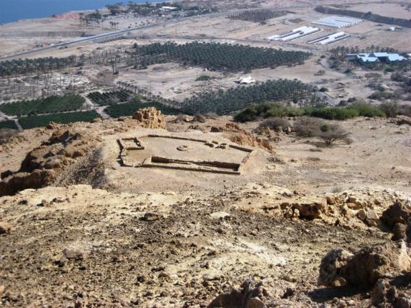 מבט מלמעלה על נאת עין-גדי והמקדש הכלקוליתי שמעל מעין עין-גדי